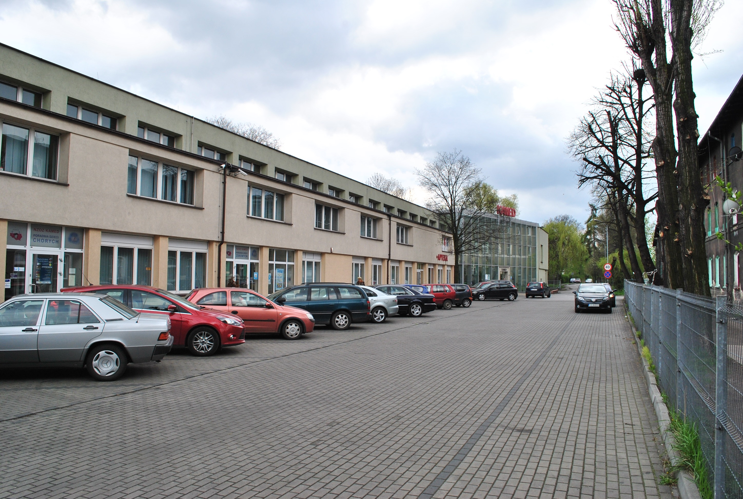 Katowice - Załęże. Przychodnia KAMED przy ul. Bocheńskiego